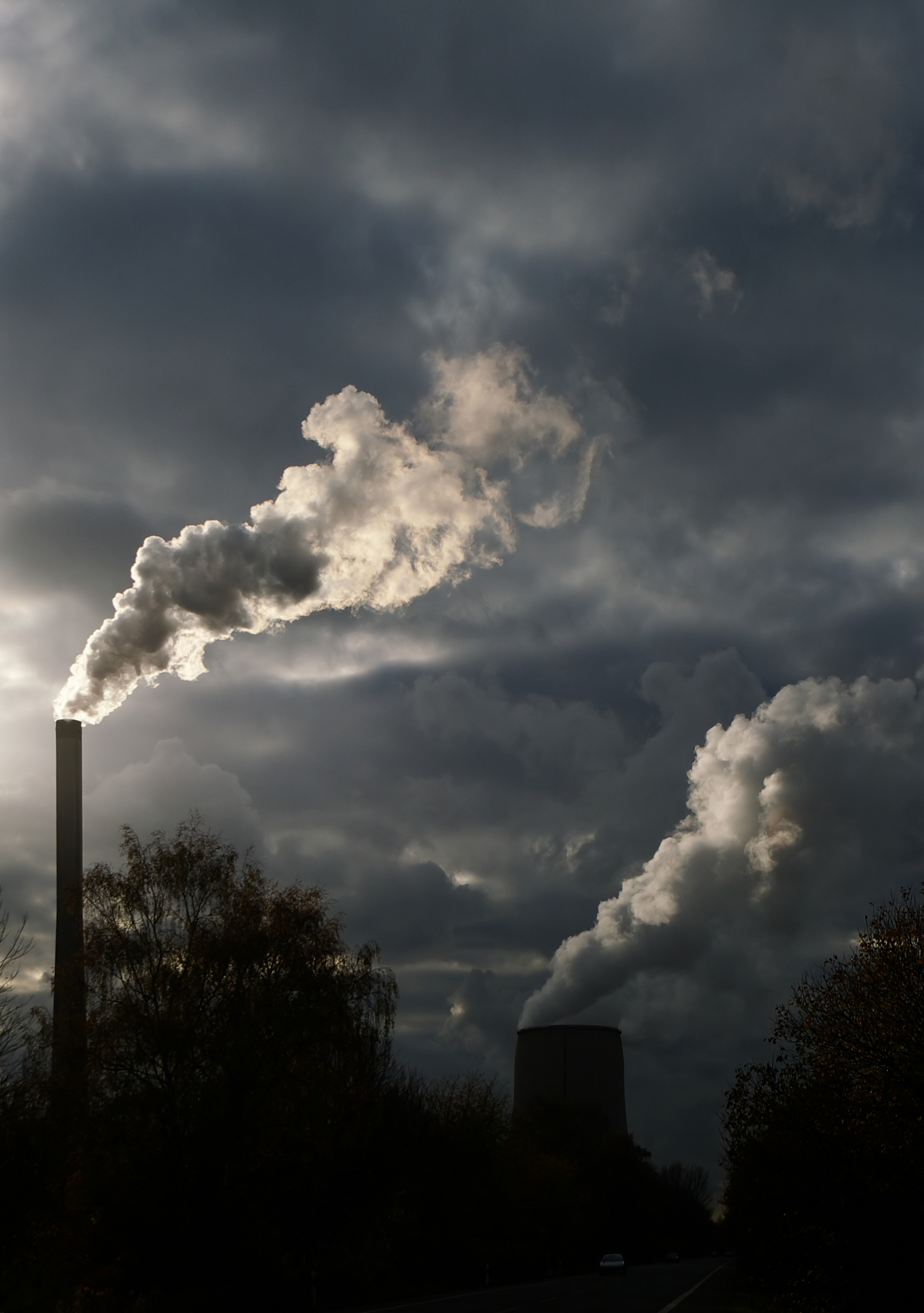 Kohlekraftwerk in Bergkamen-Heil im Gegenlicht